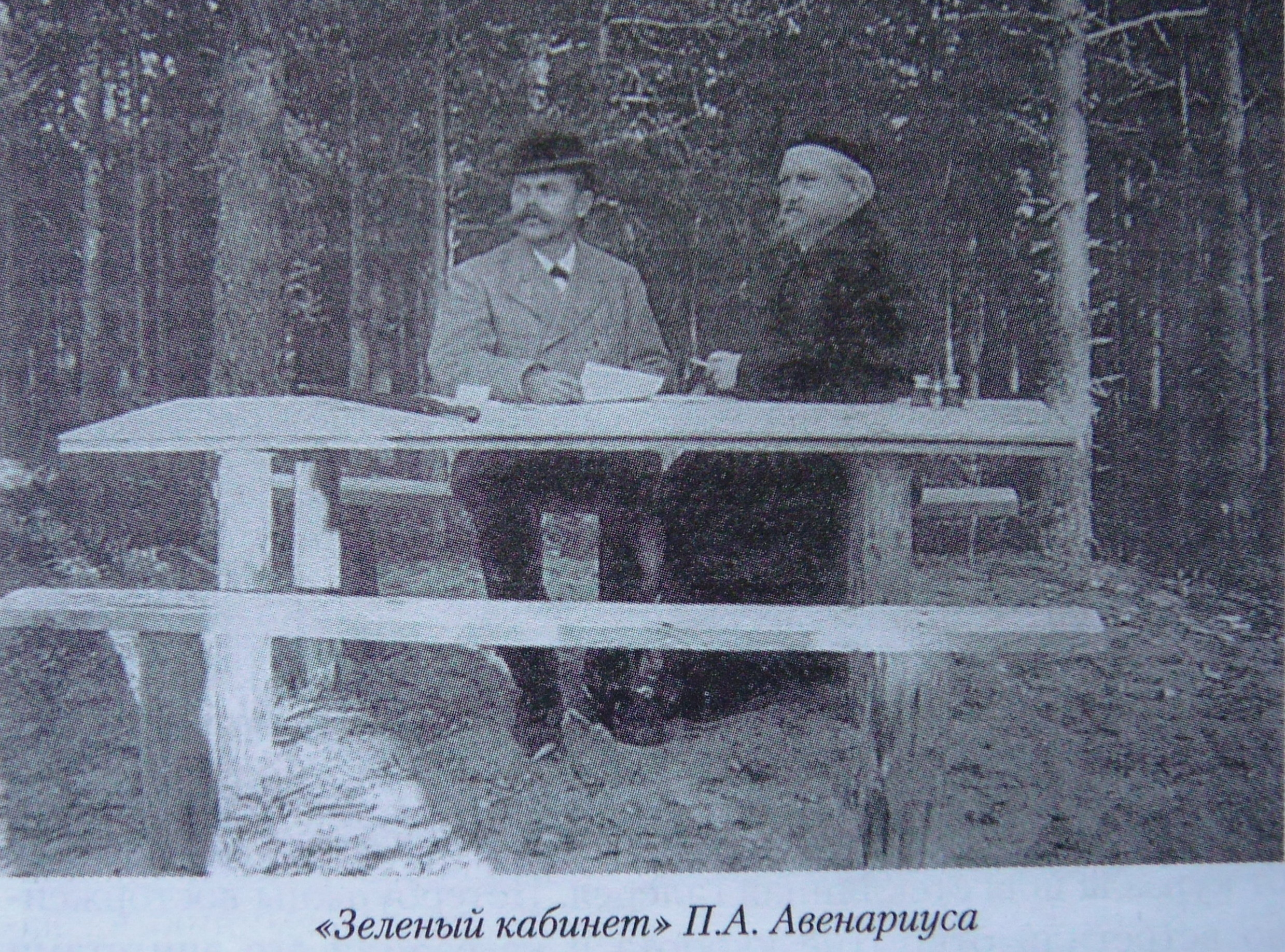 Сестрорецк Тарховка зелёный кабинет П.А. Авенариуса